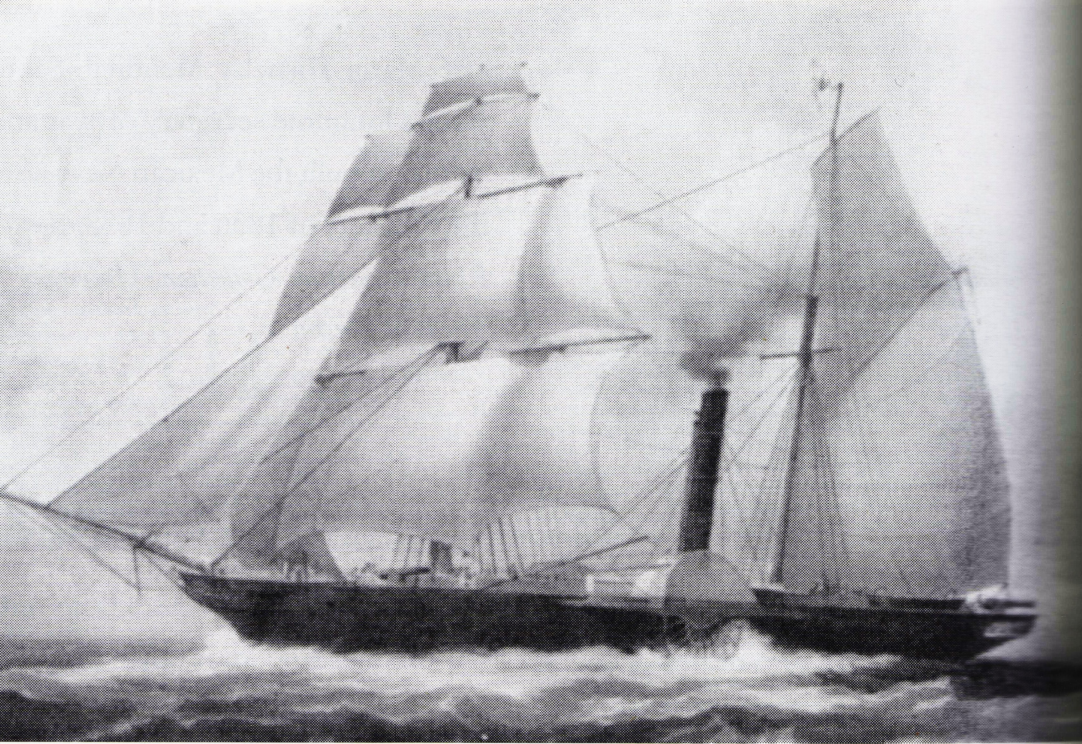 gravure de la première moitié du XIXème siècle présentant la frégate à vapeur mexicaine Guadalupe